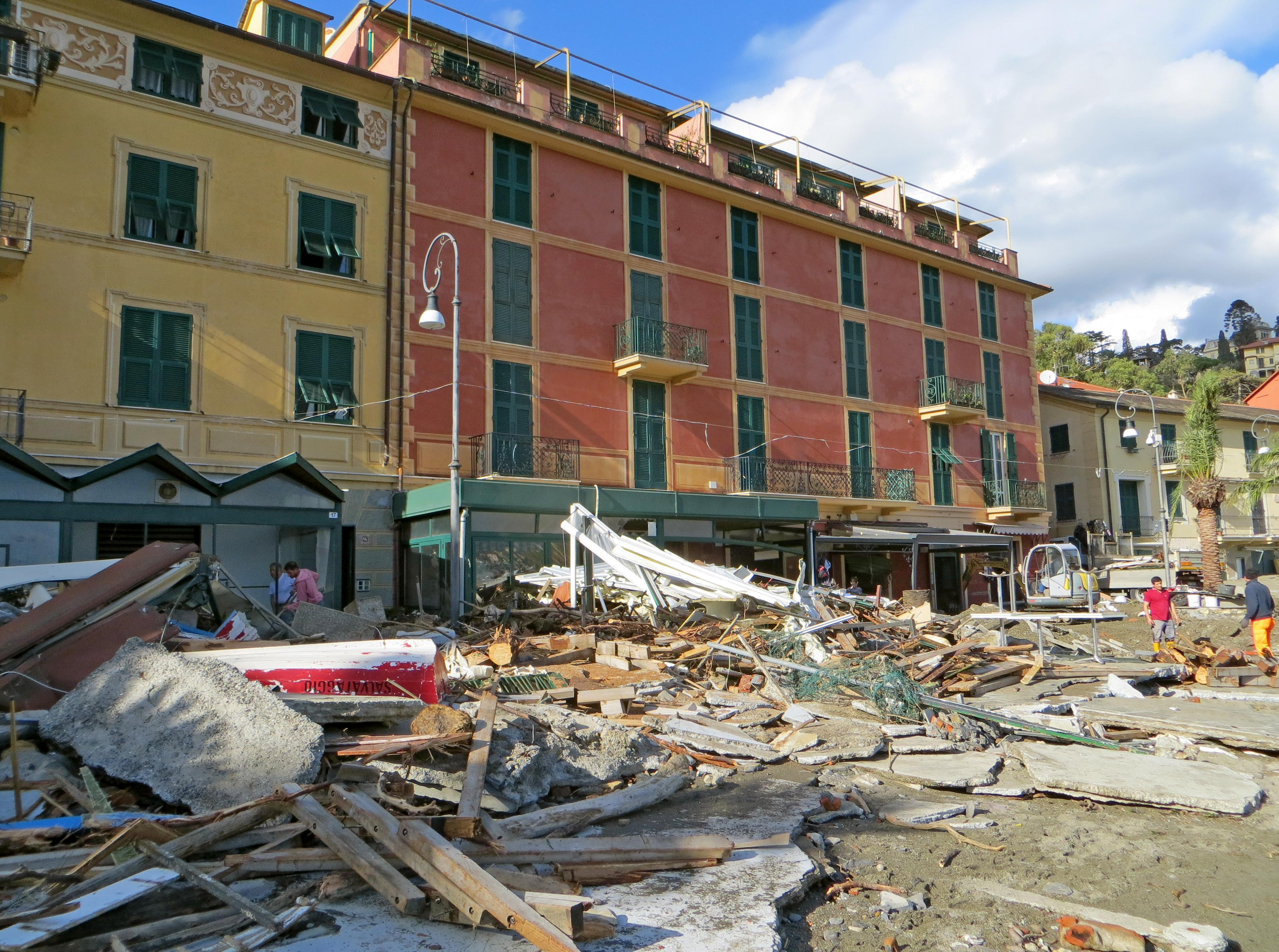 Particolare dei danni provocati dalla mareggiata del 29 e 30 ottobre 2018 a San Michele di Pagana, Rapallo, Liguria, Italia